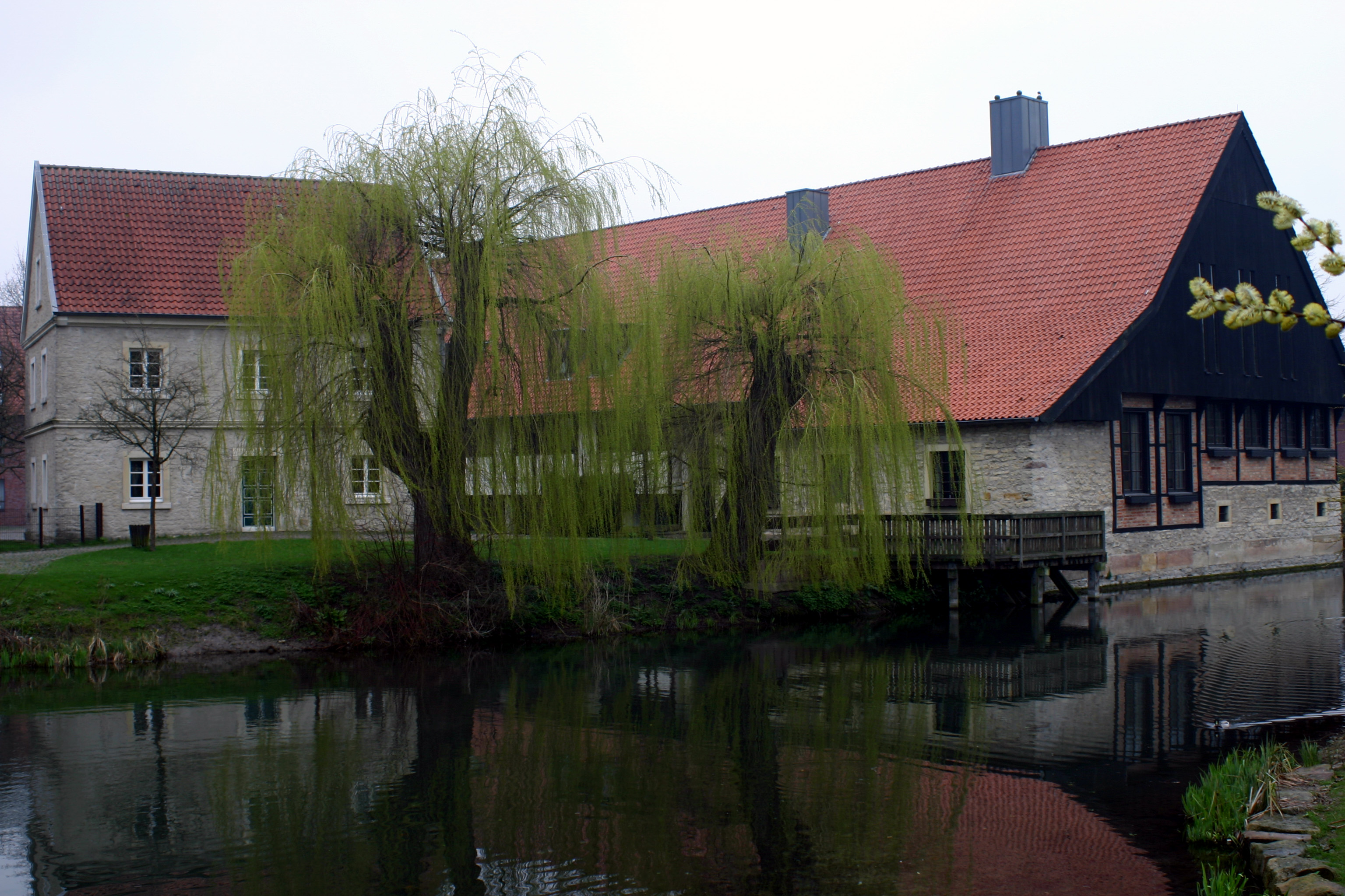 Rathaus von Laer mit Rathausteich